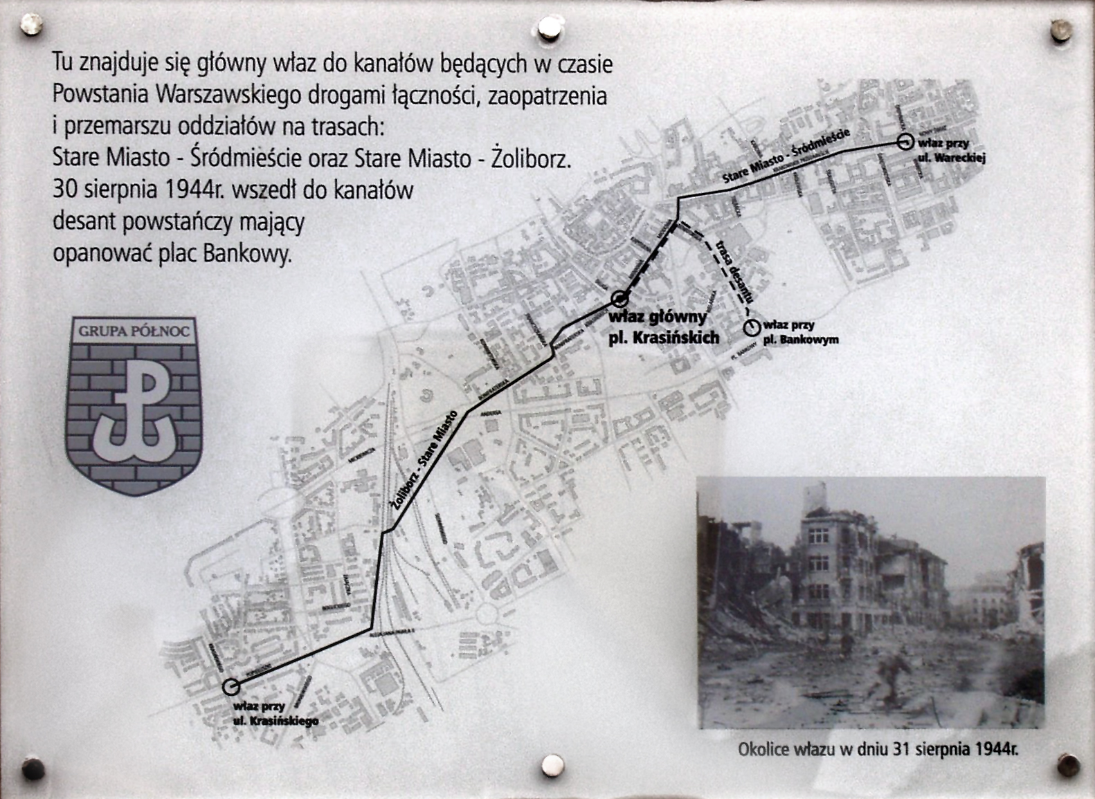 Główny właz do kanałów, pl. Krasińskich, ul. Długa w Warszawie